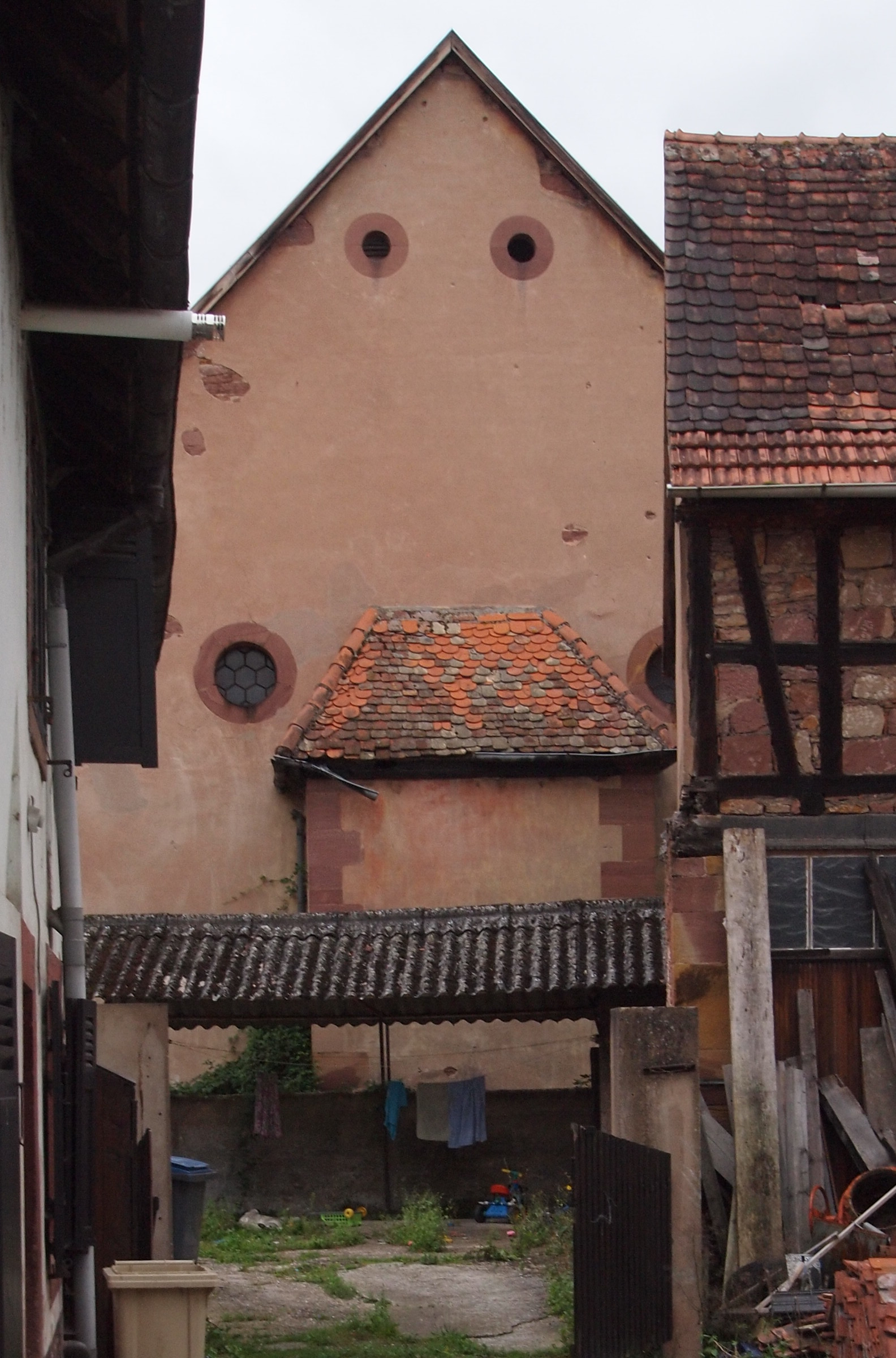 Ancienne synagogue de Reichshoffen, Alsace